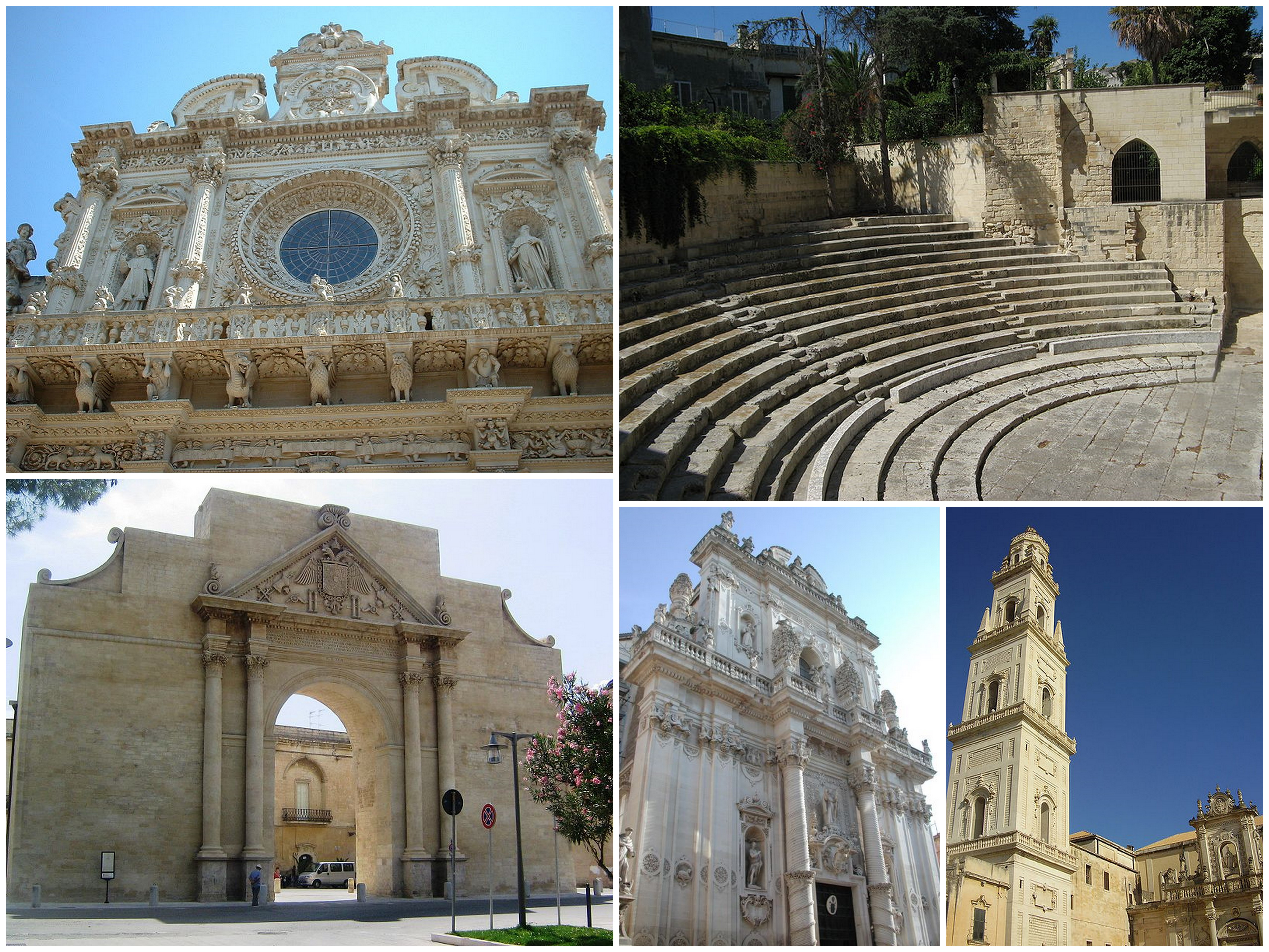 Collage di alcune immagini di Lecce